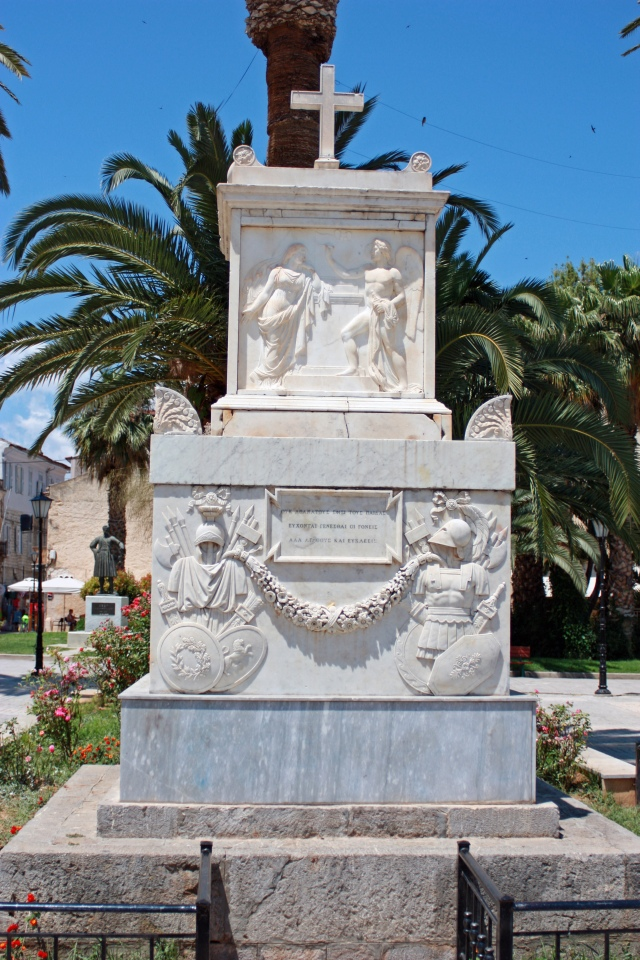 Paminklas nepriklausomybės kovų kovotojams, Nafplijas, Graikija.